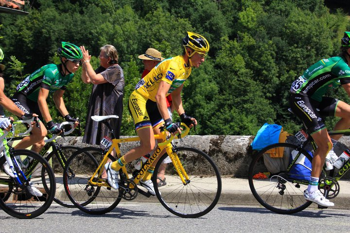 Thomas Voeckler toujours en jaune à Aspect